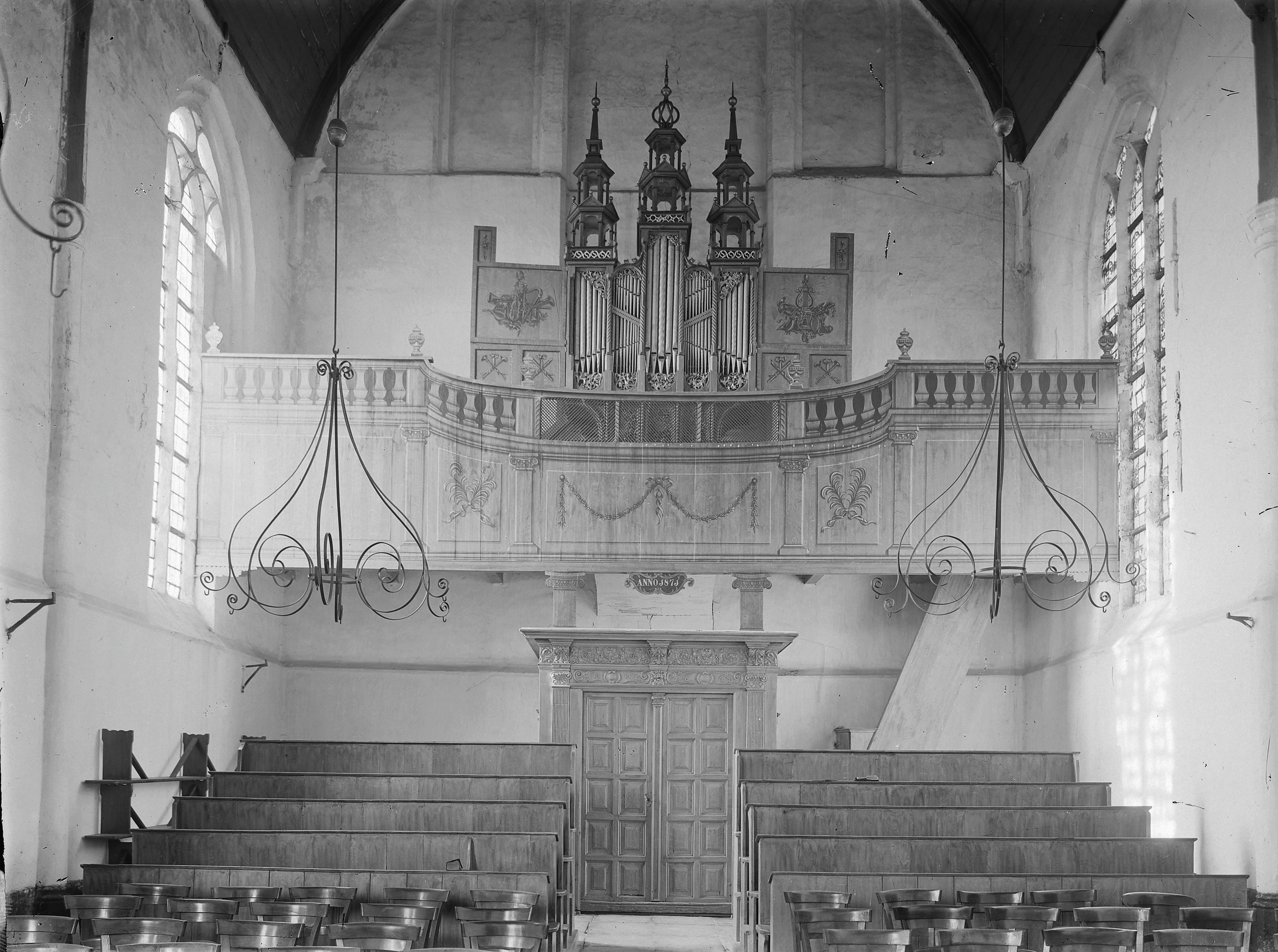 Nederlands Hervormde Kerk: Interieur, overzicht naar het orgel